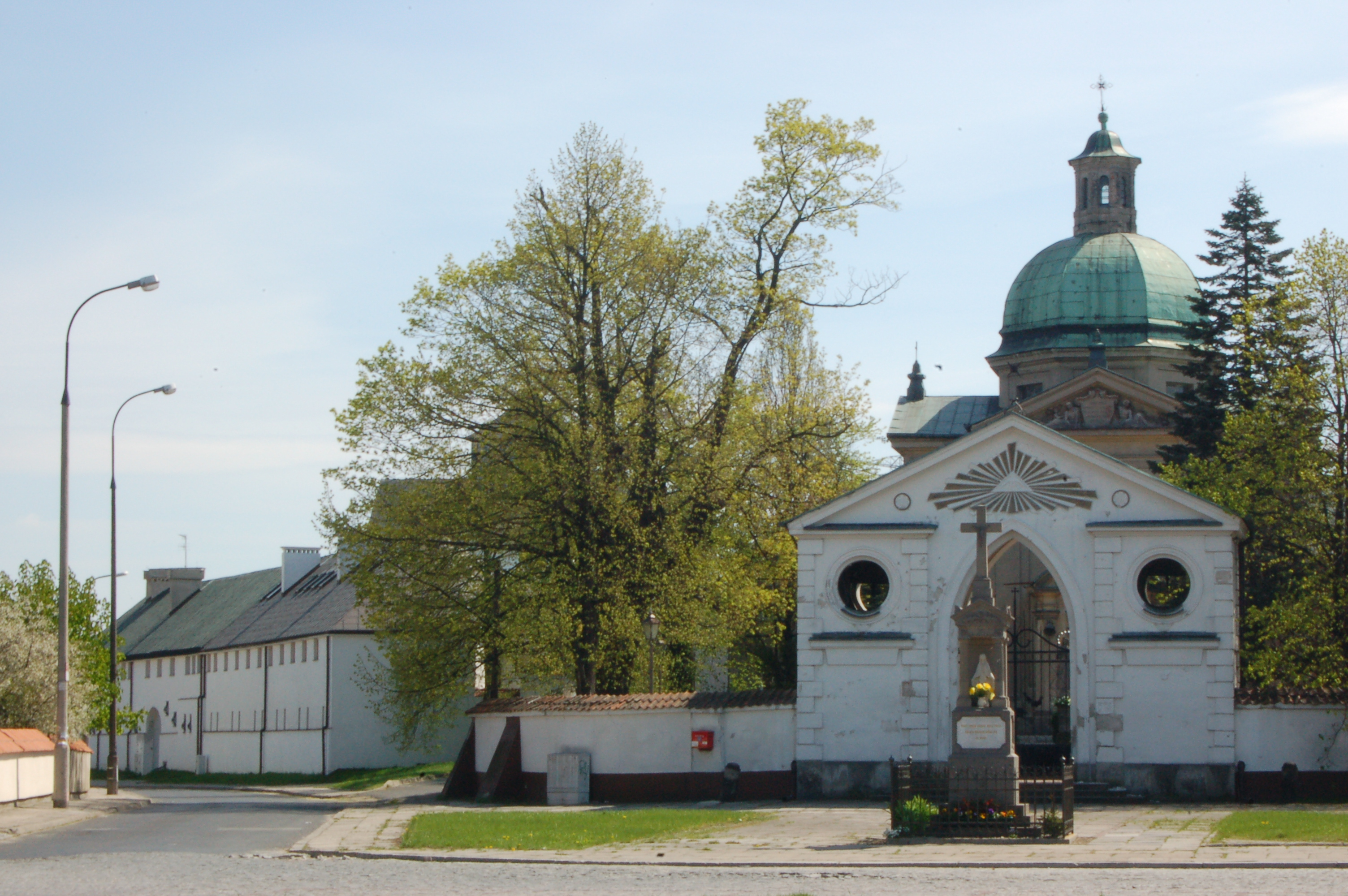 Church of St. Anthony in Czerniaków